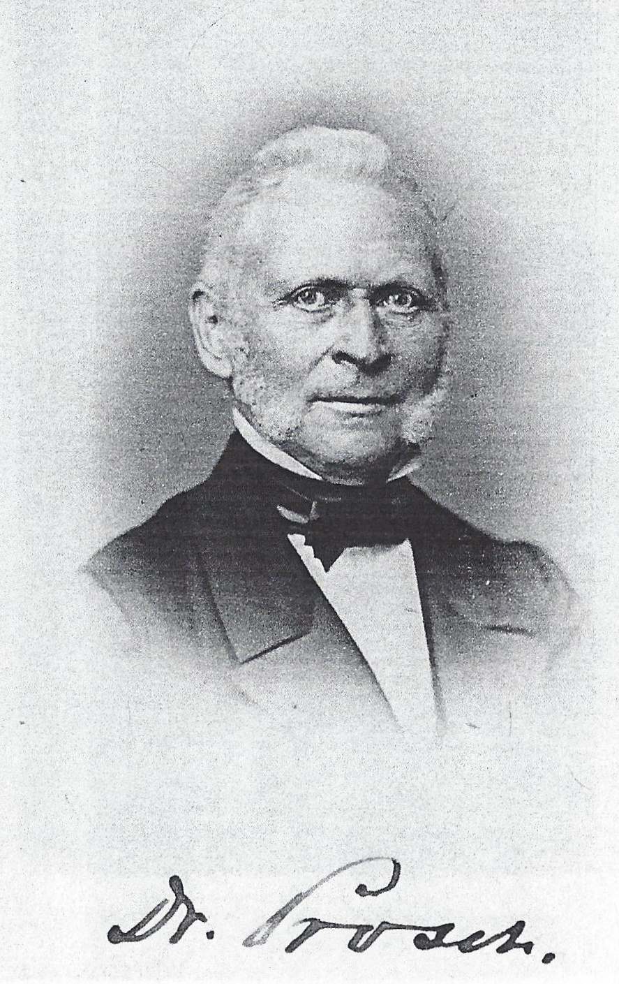 Signierte Porträtfotografie von Karl Prosch (1802-1876)